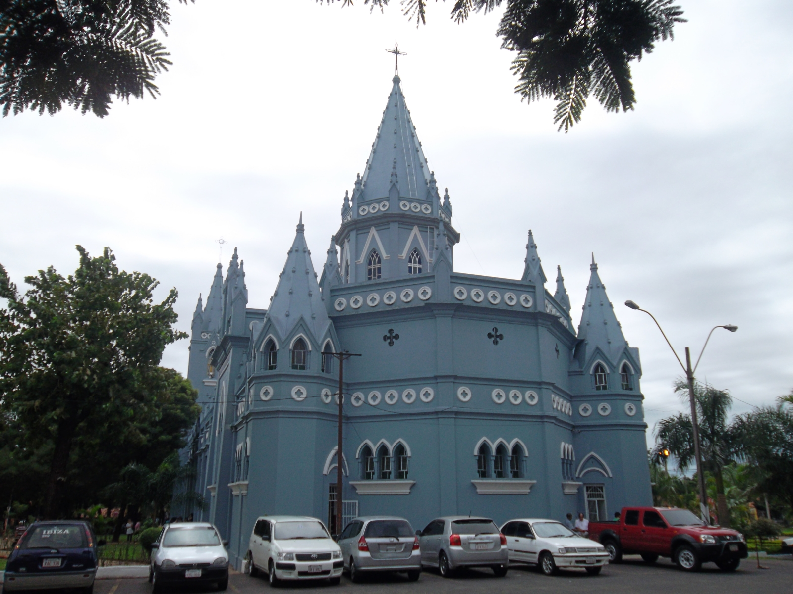 Toma de la parte posterior de la Catedral de San Lorenzo, Paraguay